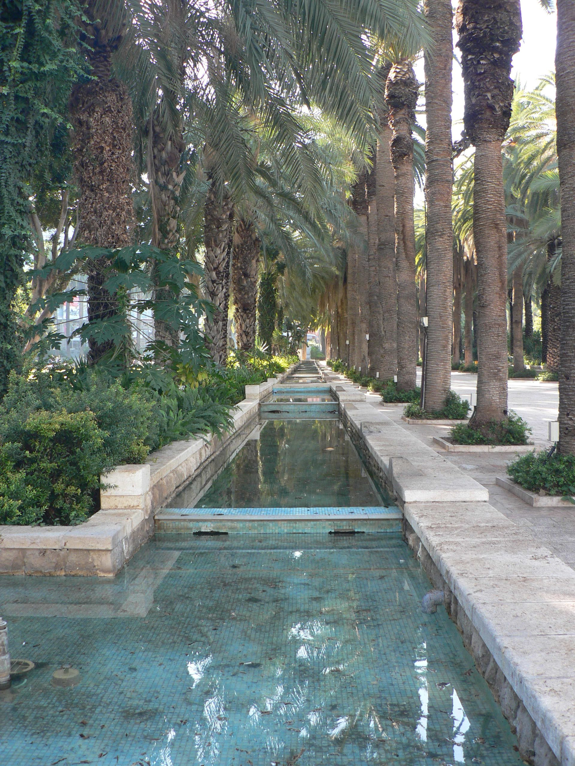 Gan Hamoshava of Rishon LeZion גן המושבה של ראשון לציון Author: MathKnight